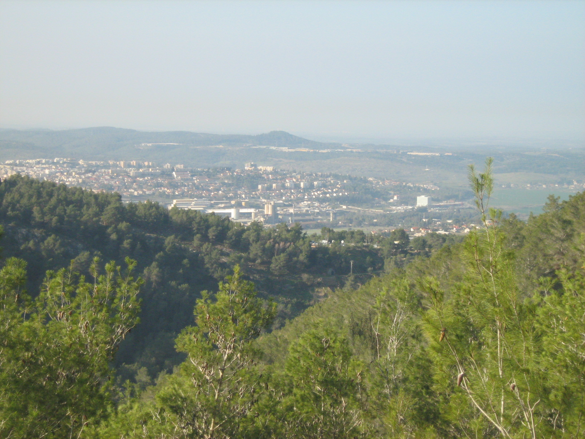 בית שמש מכיוון נחל כסלון